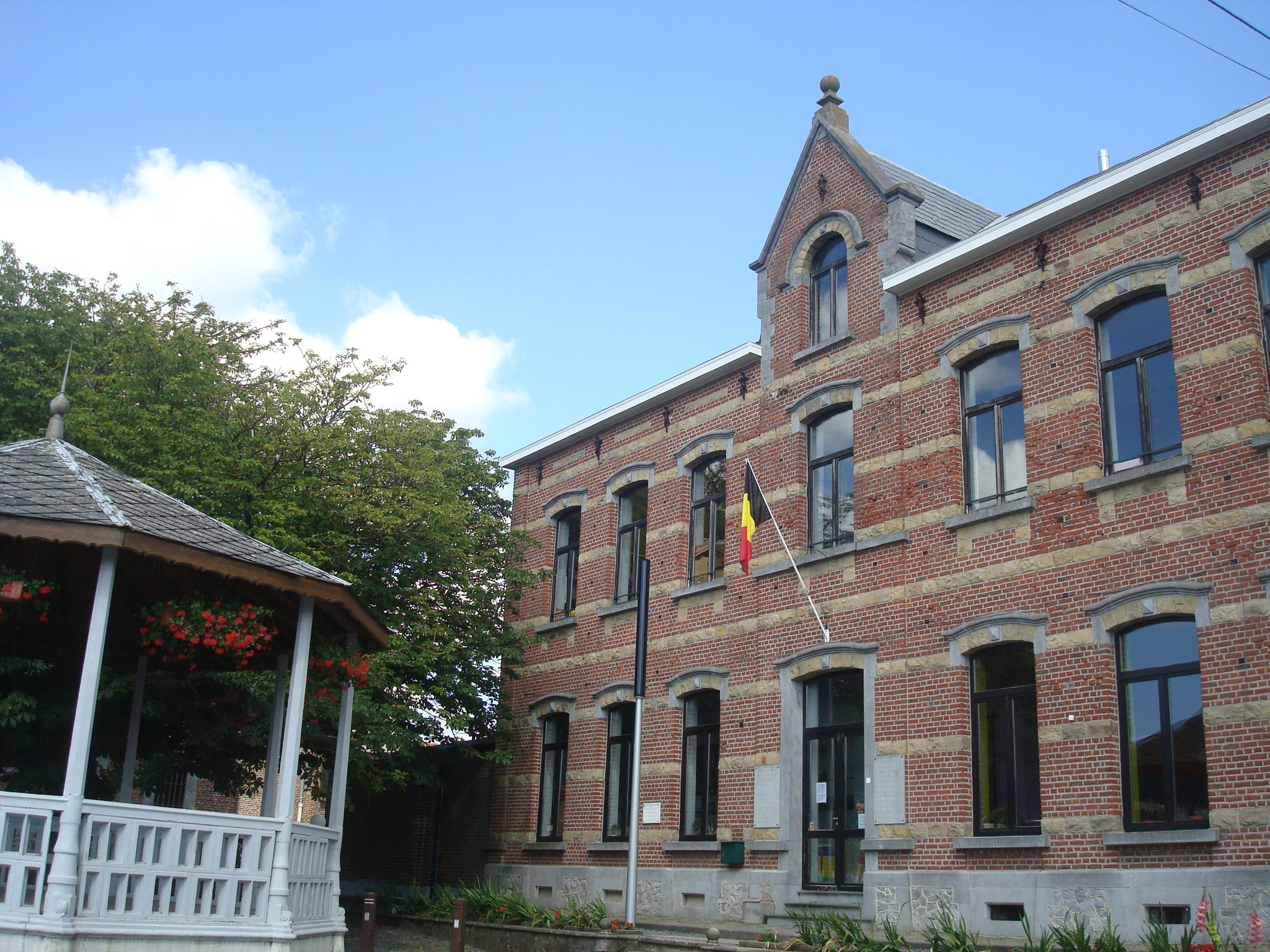 école de Mont-Sainte-Geneviève de style eclectique